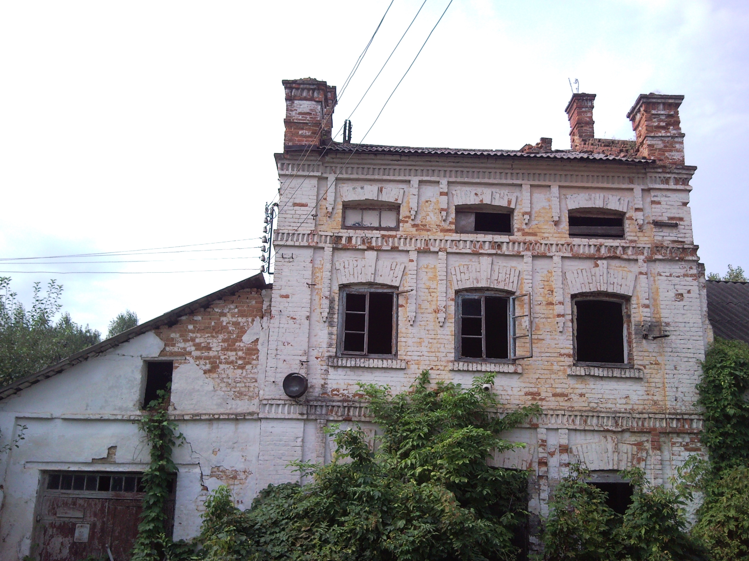 Шершні Плодоконсервний завод